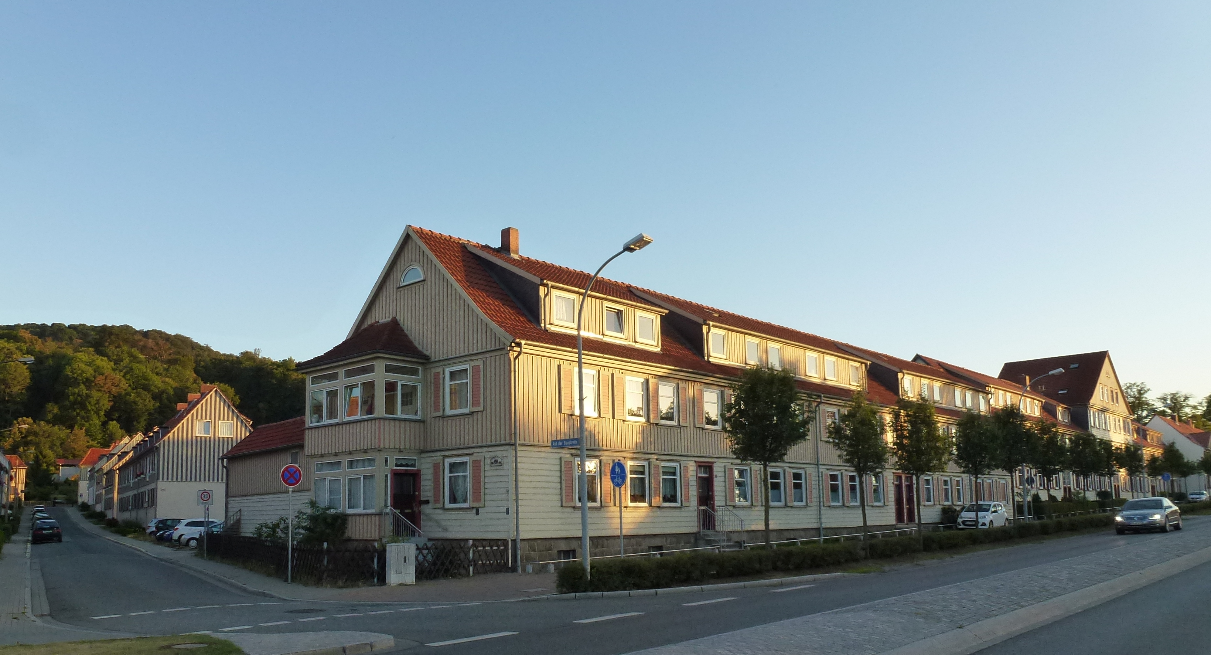 Häuser an der Halberstädter Straße mit Blick in die Straße Auf der Burgbreite.